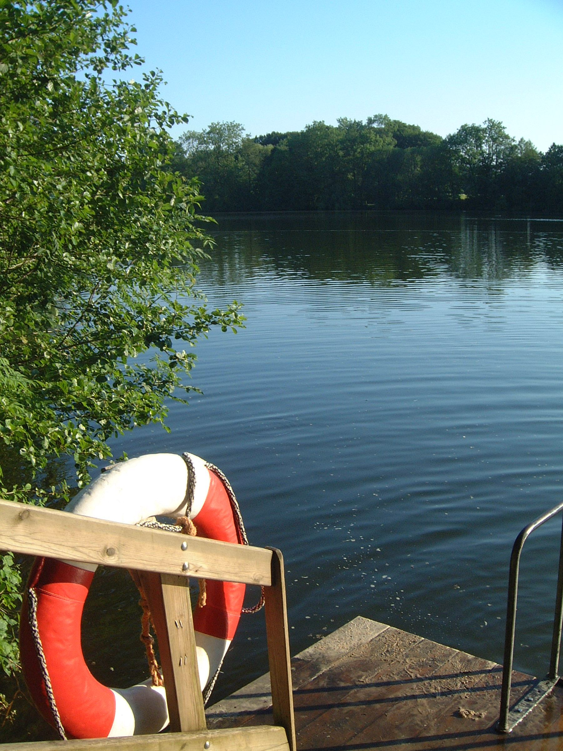 Badestelle in Hennstedt (Steinburg)